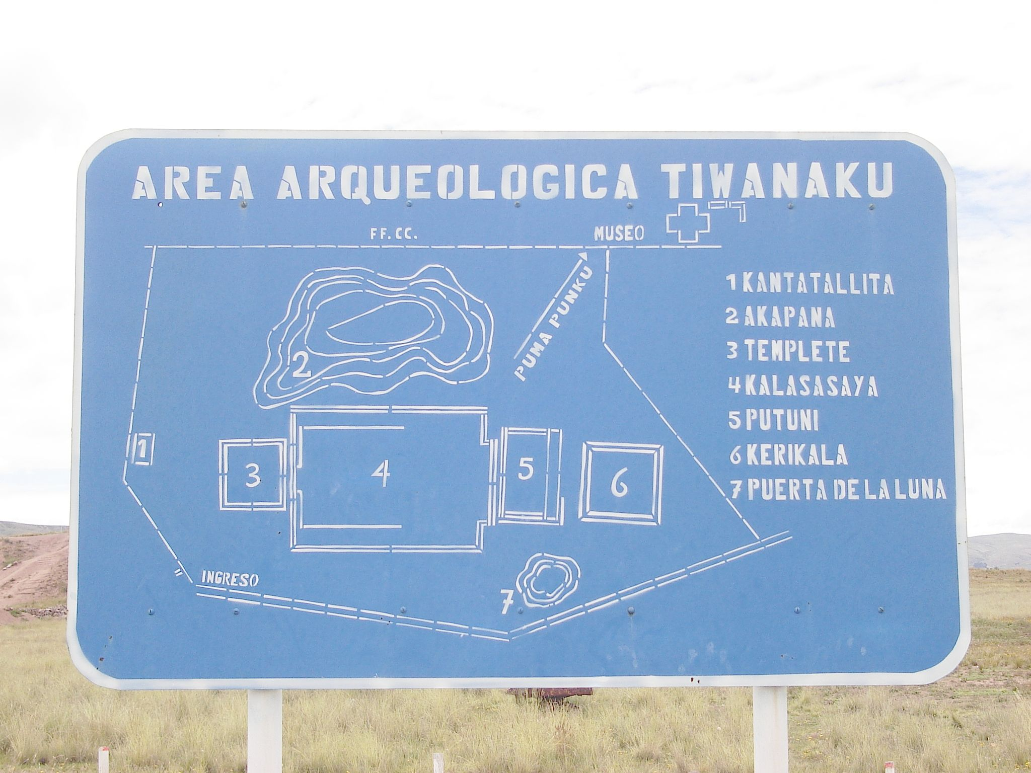 Foto tirada por mim, em Tiwanaku.